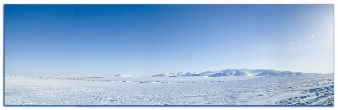 Полярный-Ленинградский